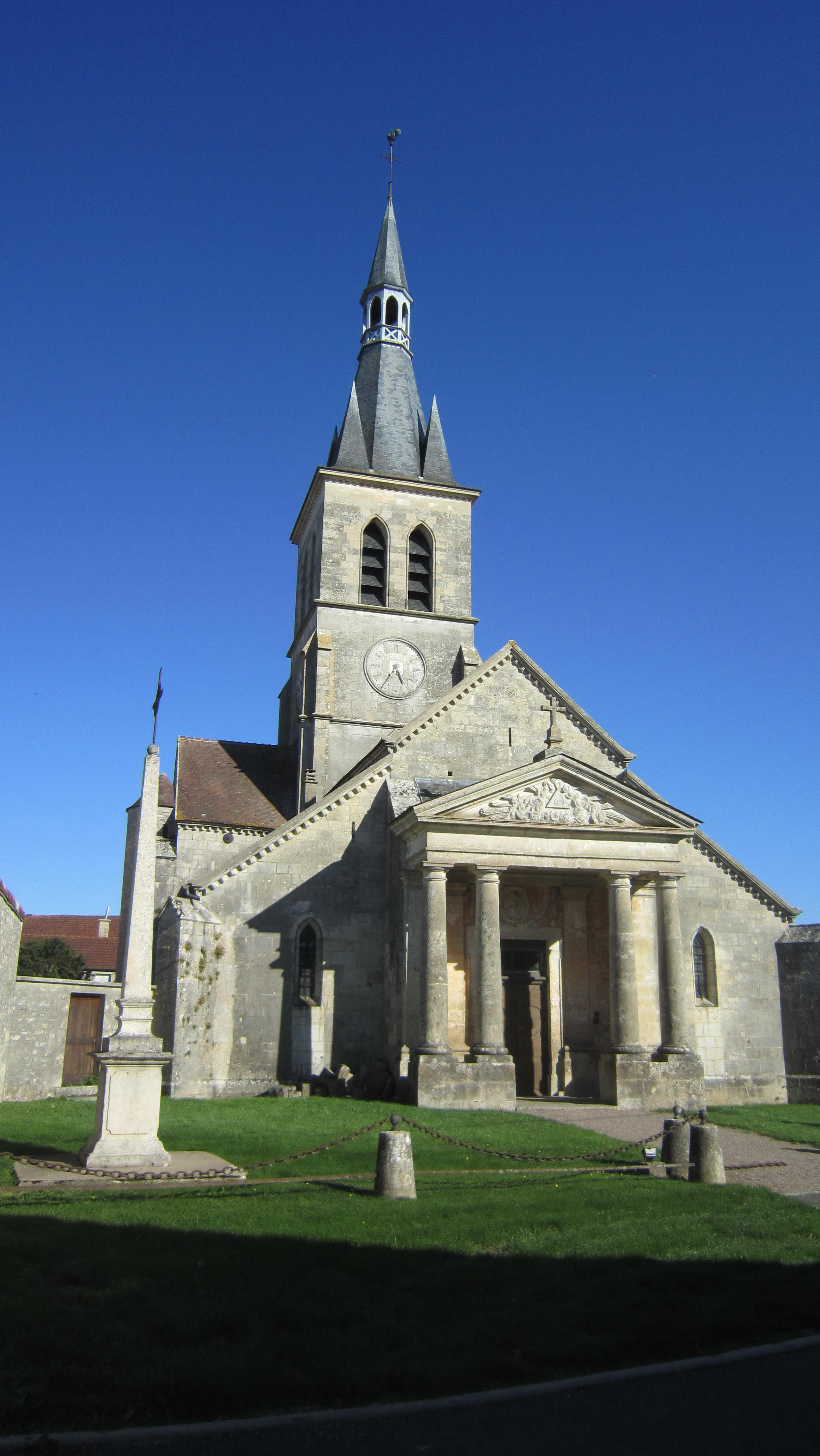 Eglise de Coulmier-le-Sec (Côte-d'Or)